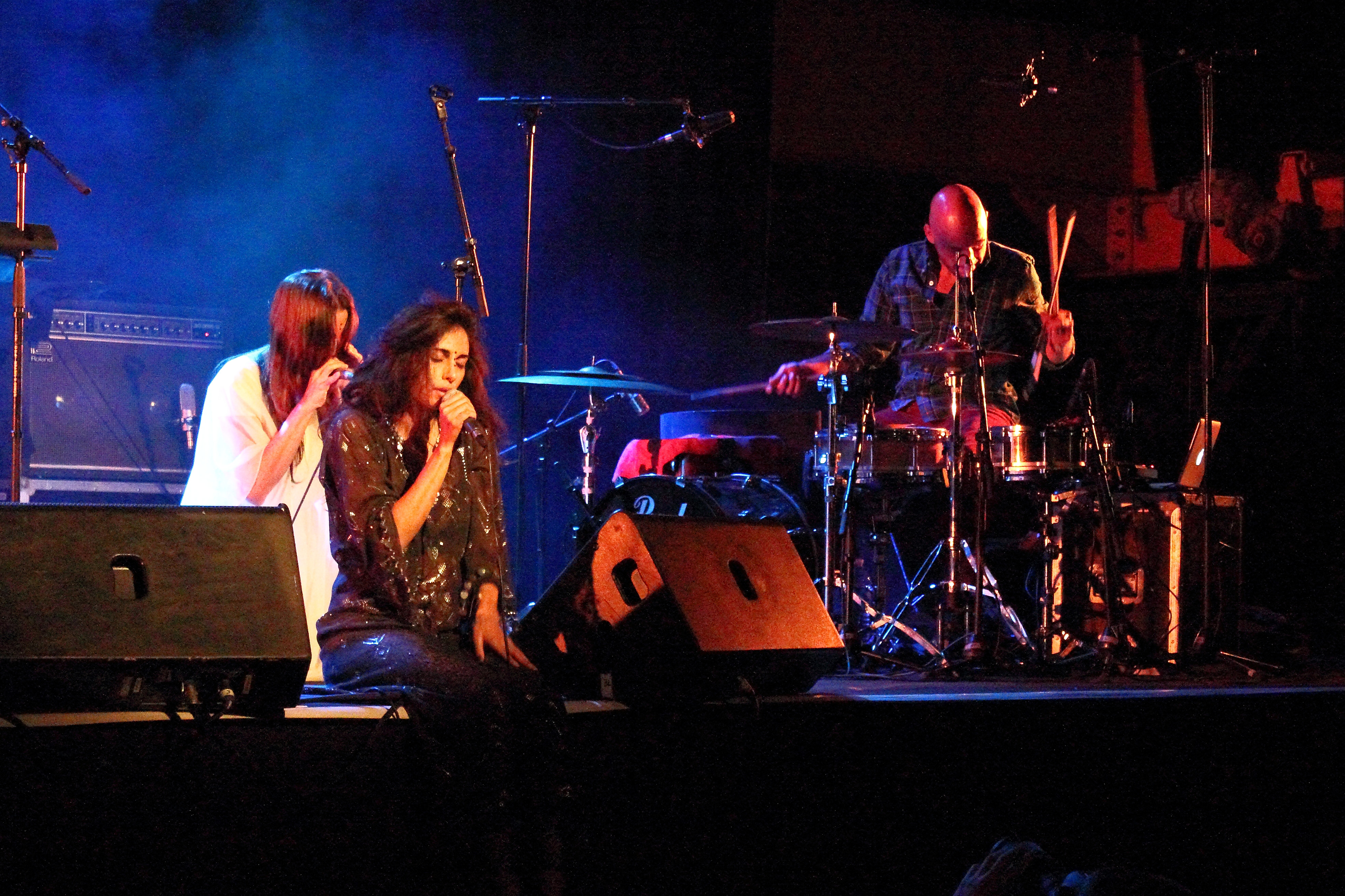 Concert de Yasmine Hamdan au Workshop Infiné #5 - Carrière de Normandoux à Tercé, août 2013. Pour écouter l'album "Ya Nass" Flickr Tags: Workshop Infiné Tercé Normandoux Musique Music Electro Concert Stage Scène Show Festival Techno Carrière Musicien Musician Live Yasmine Hamdan. from Flickr album "Le Workshop Infiné" by Xi WEG from Poitiers, France and Flickr album "La Carrière de Normandoux" by Xi WEG "Les Soirs d'été de la Carrière de Normandoux. La Carrière de Normandoux sur Facebook.